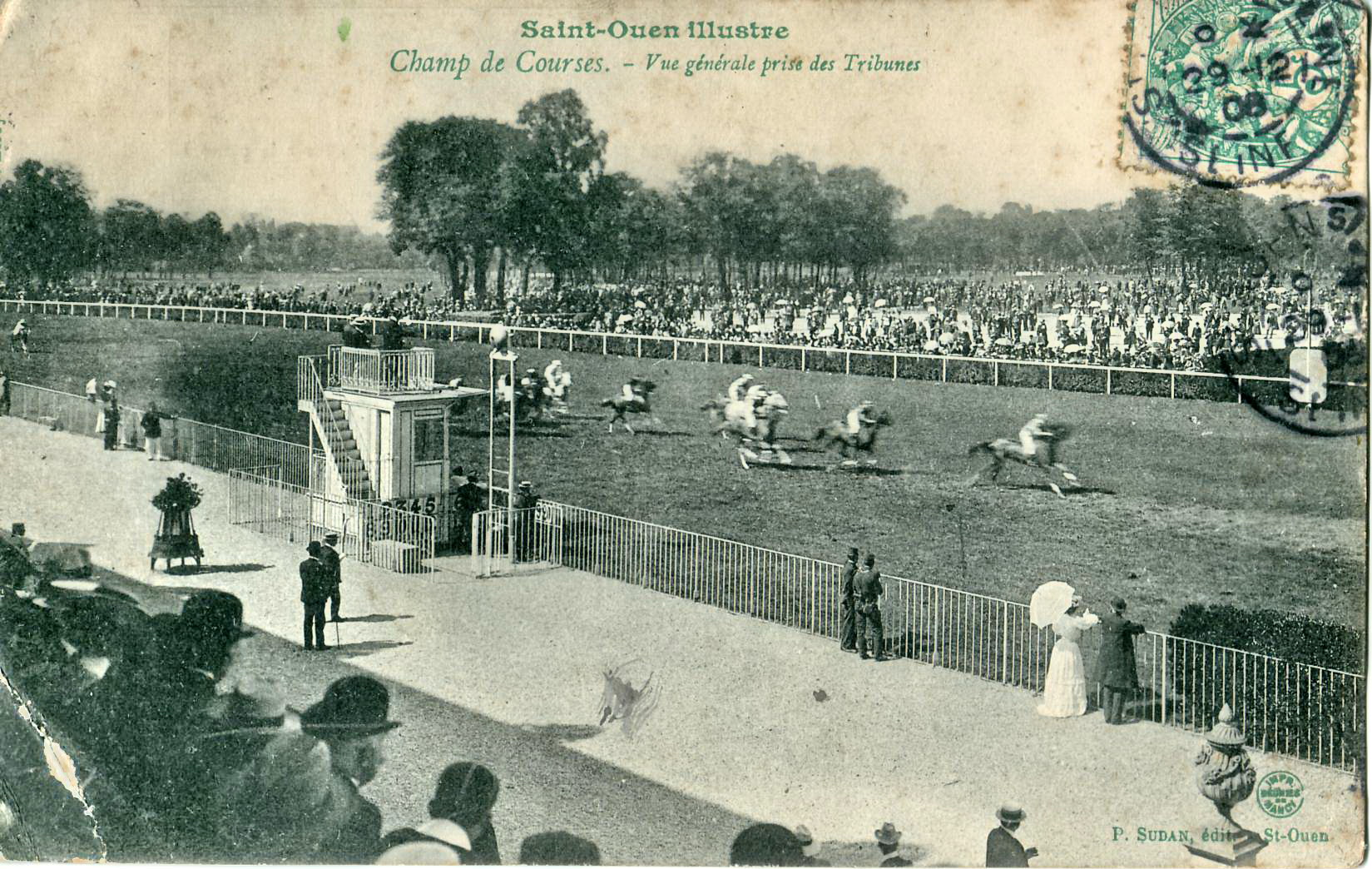 Carte postale ancienne éditée par SudanSAINT-OUEN (Seine Saint Denis) : Champ de courses - Vue générale prise des tribunes